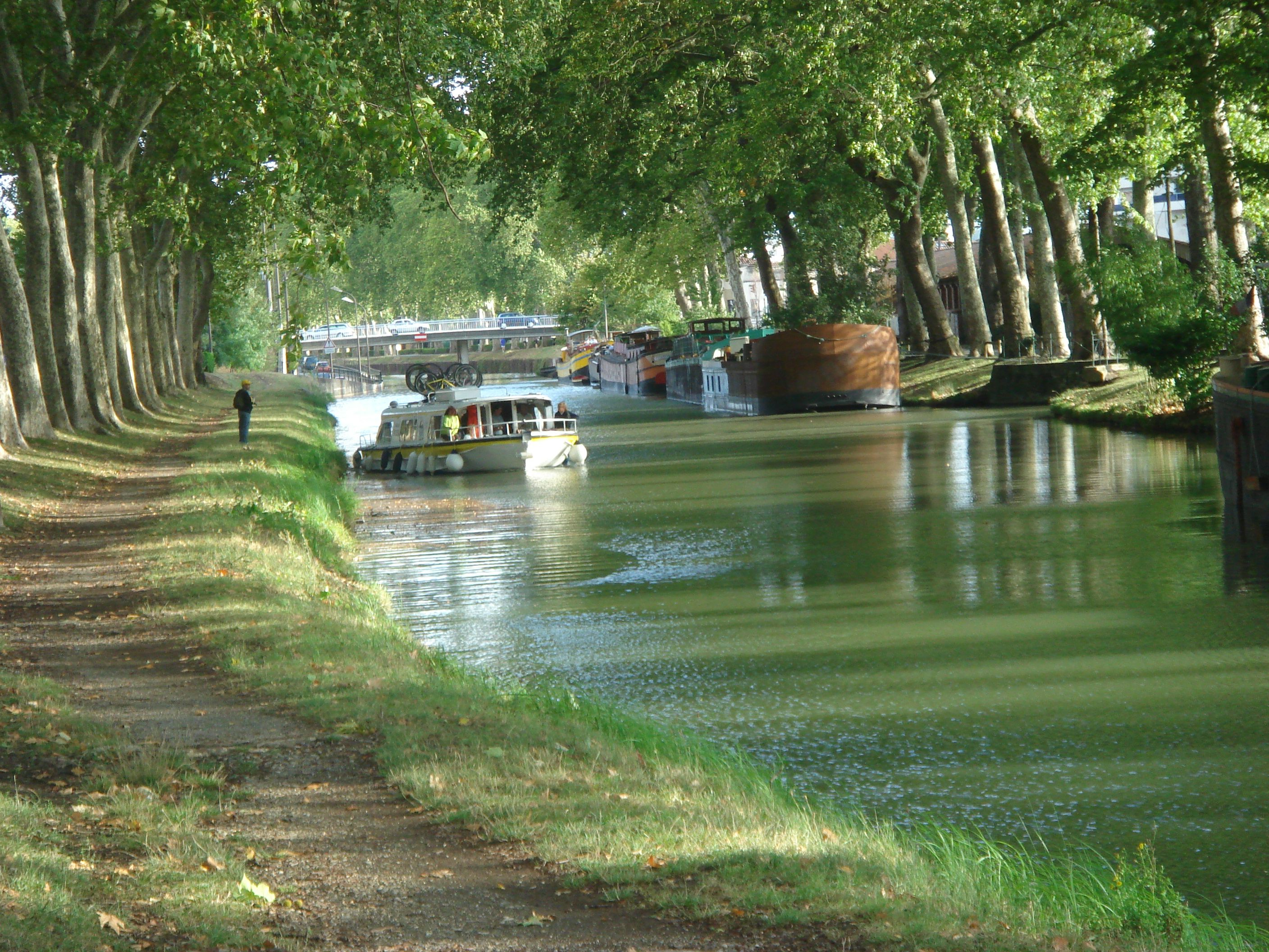 le canal du Midi près du pont des demoiselles à Toulouse